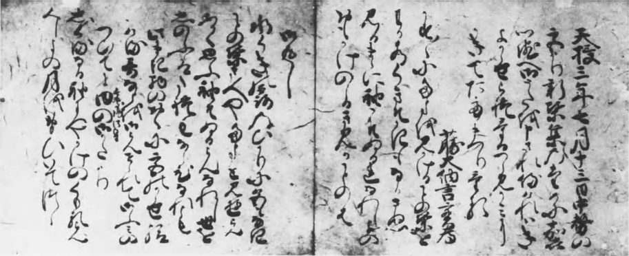 嘉喜門院集の袖書